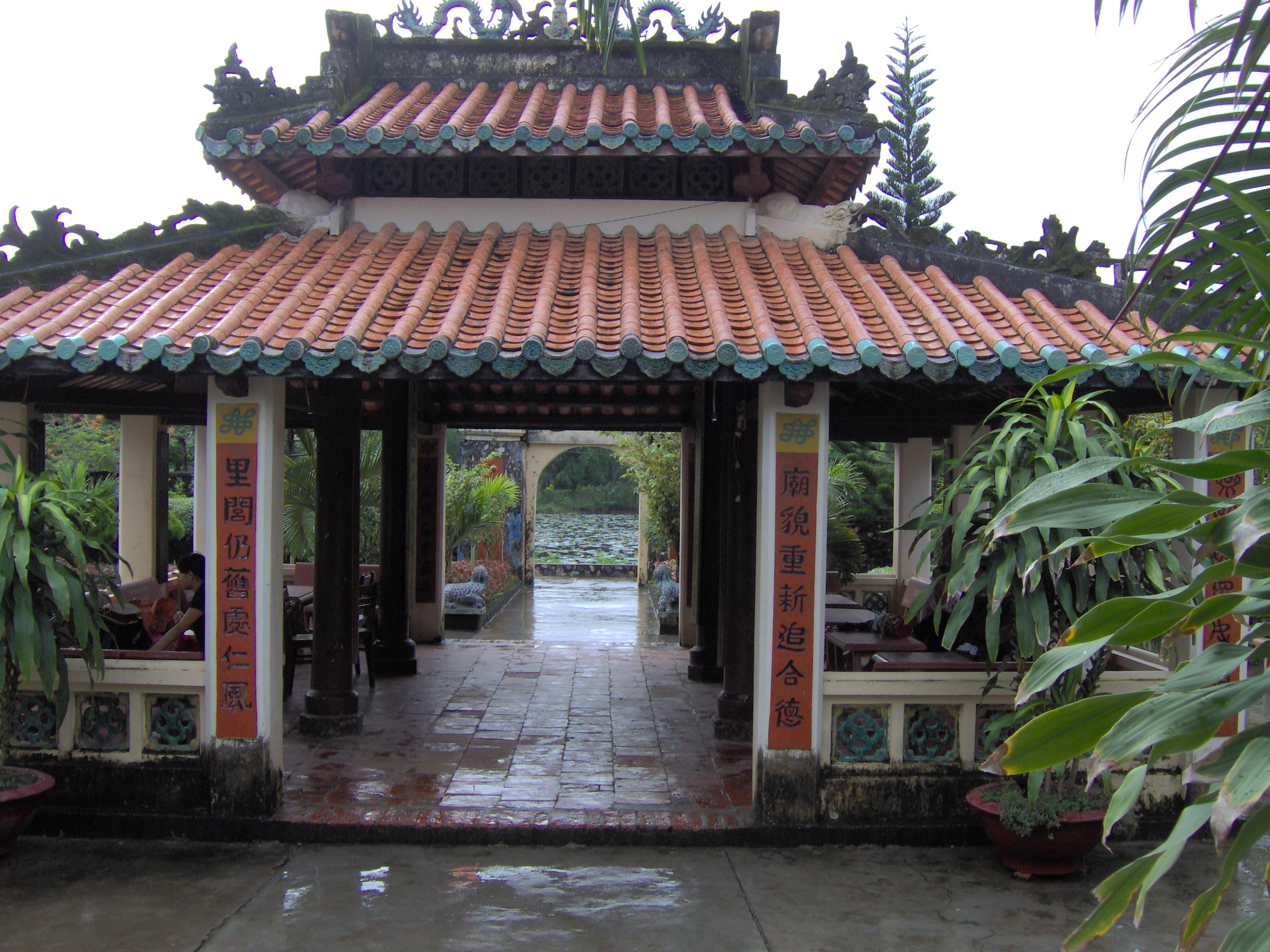 Lăng ngài Mạc Cửu cùng phu nhân và các hậu duệ tại Hà Tiên, Kiên Giang